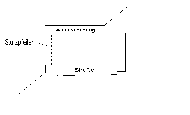 Galeriestraße.